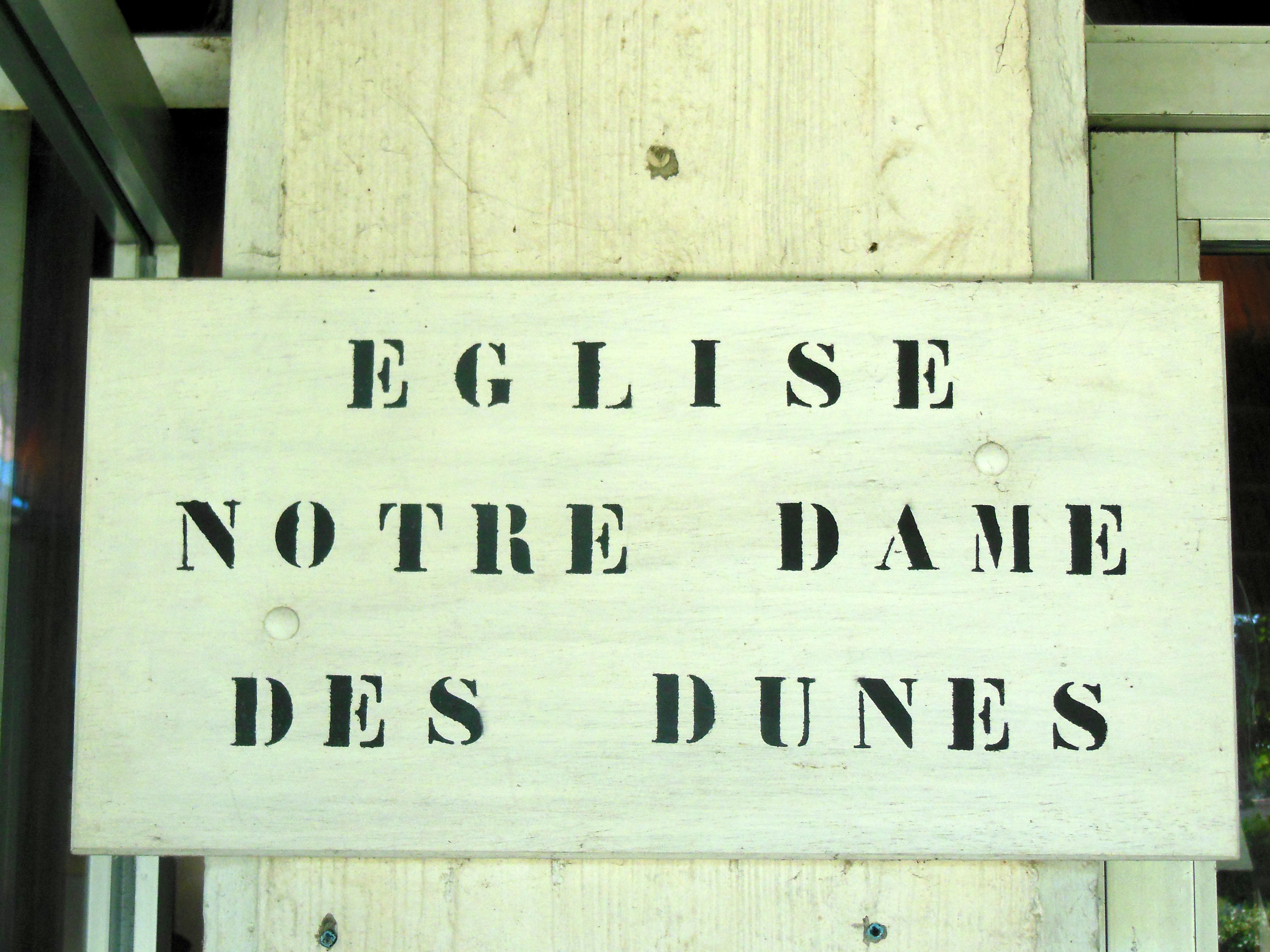 Chapelle Notre-Dame des Dunes de Mimizan-Plage (Landes, France). Pancarte